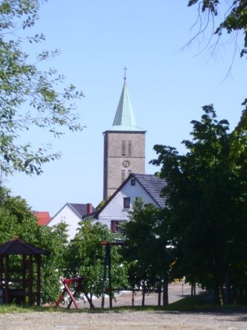 Küllstedt (Eichsfeld), kath. Kirche St. Georg und Juliana